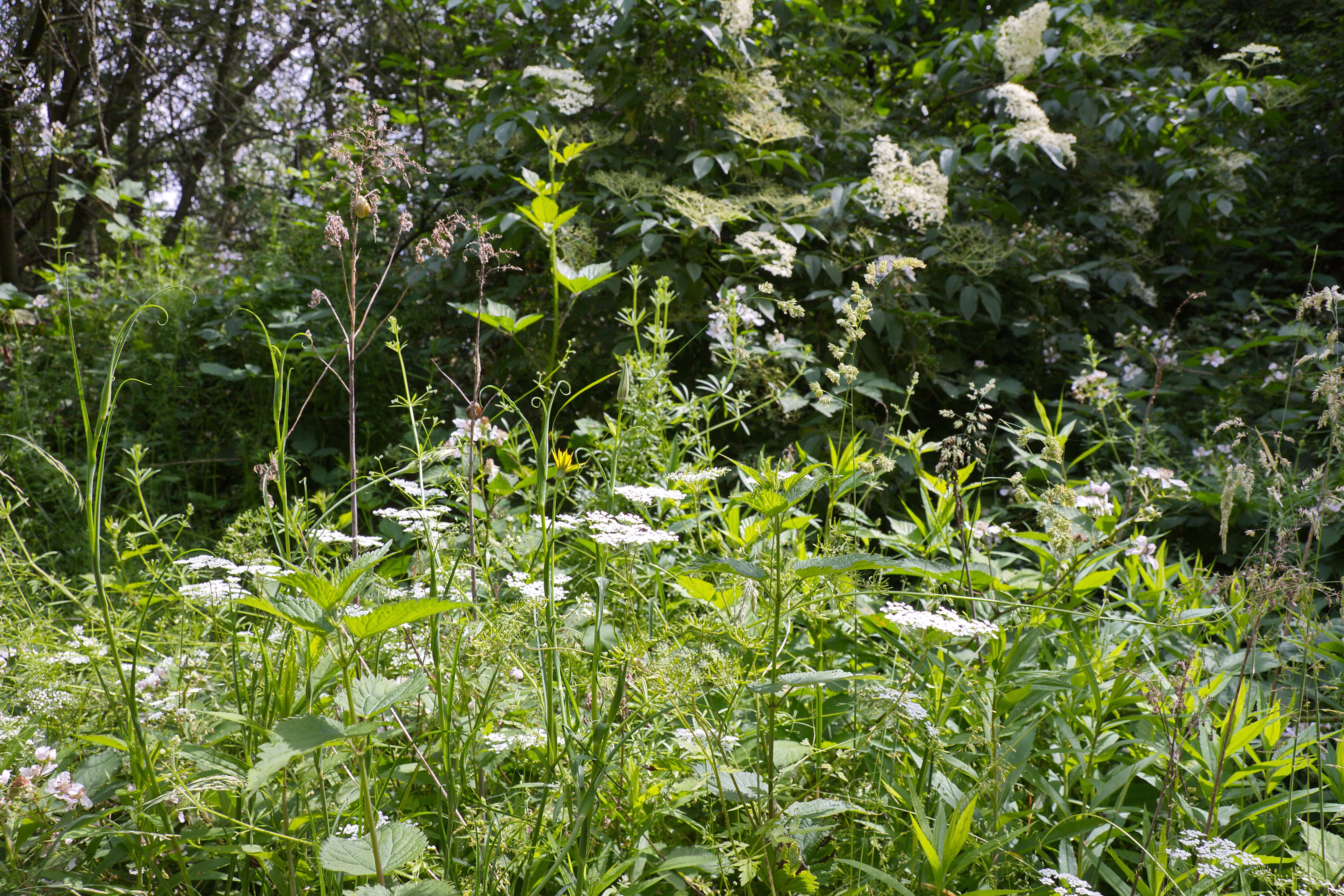 Landschaftsschutzgebiet Brelinger Berge in Niedersachsen, Deutschland